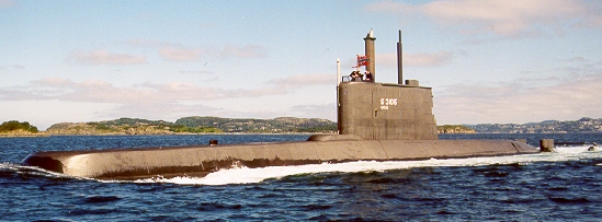 KNM Utvær